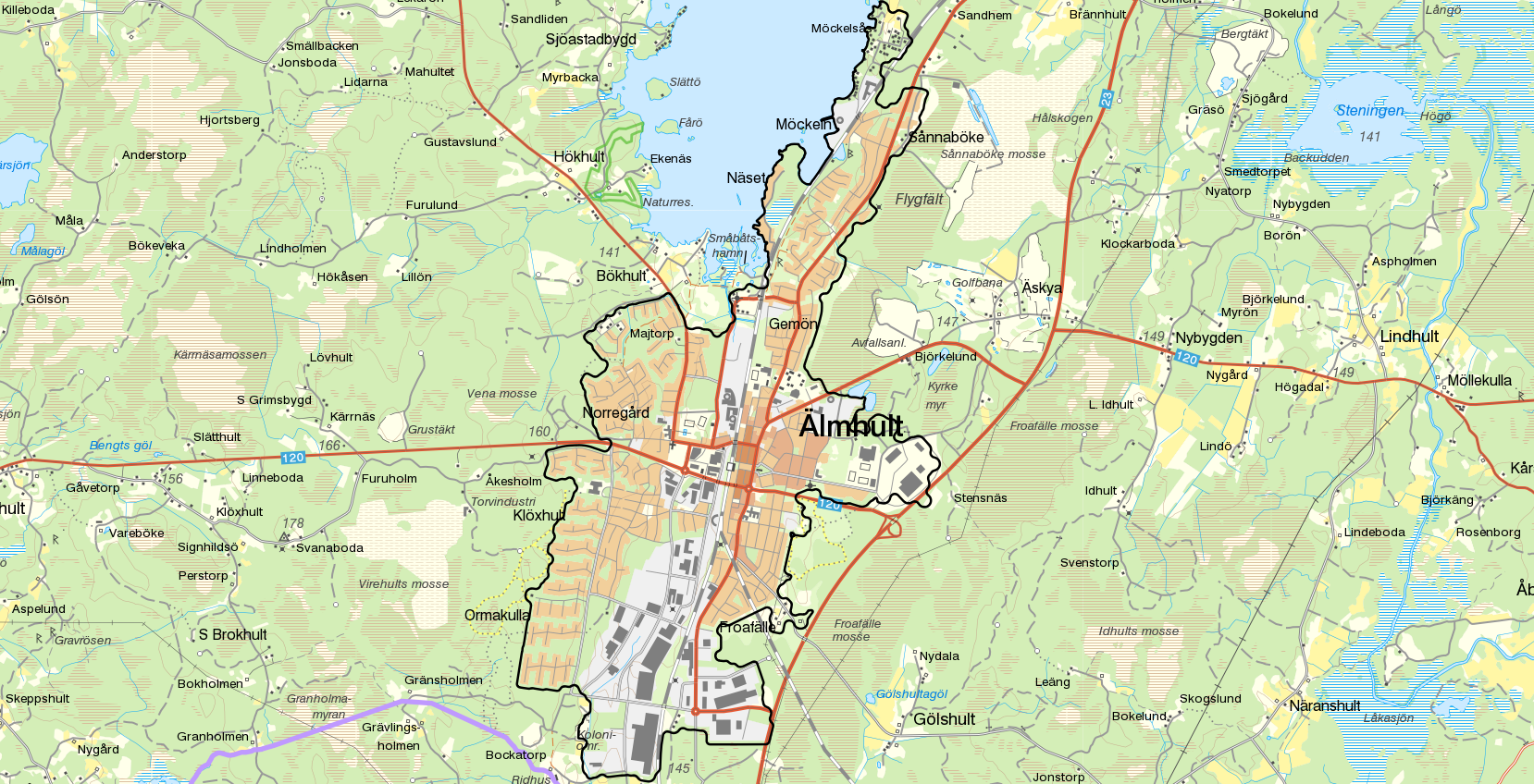 Tätorten Älmhult med gränserna från Statistiska centralbyråns tätortsavgränsning 2015 i svart. Bakgrundskarta från Lantmäteriet, skala 1:30 236.